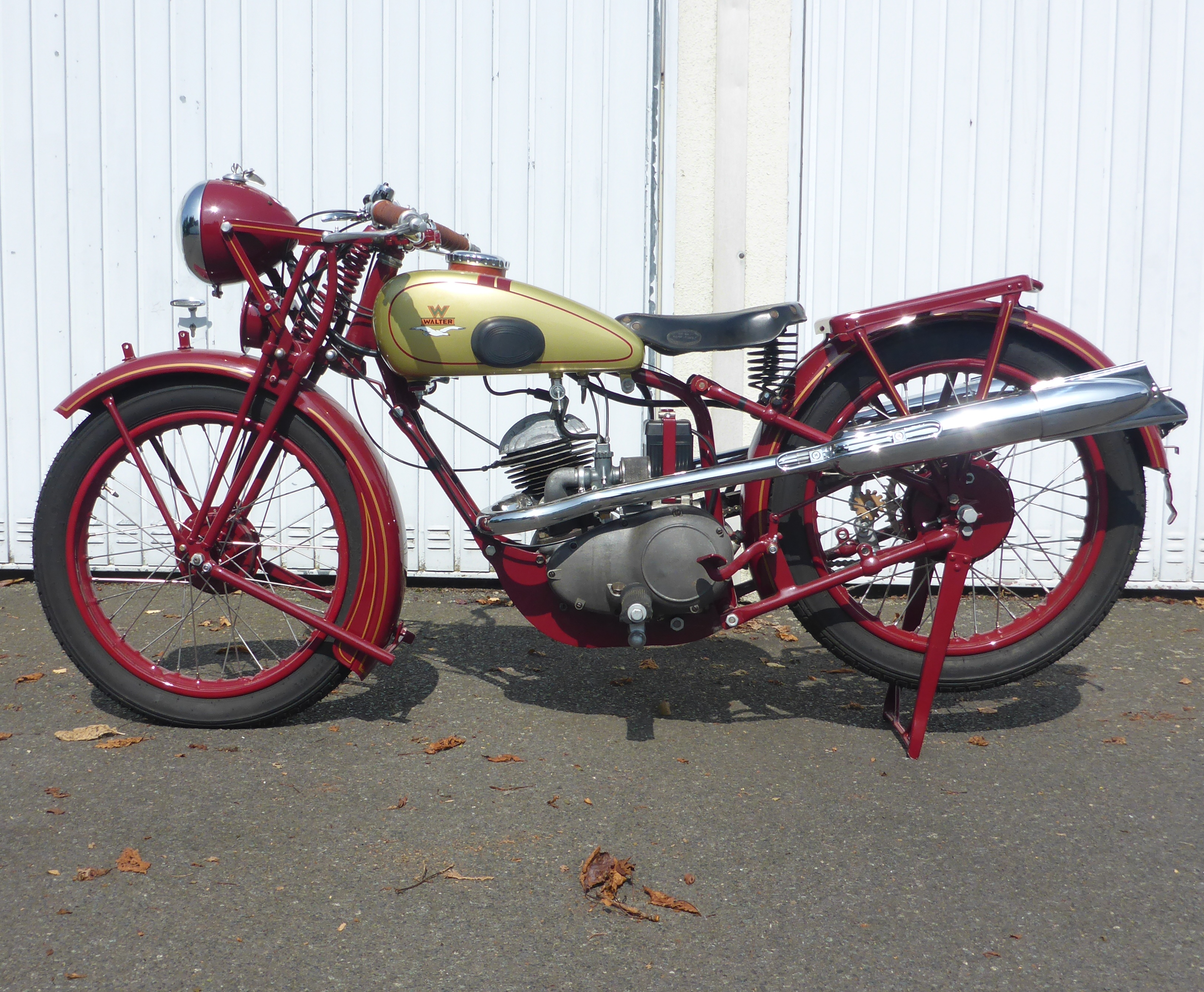 Restauriertes Walter Motorrad